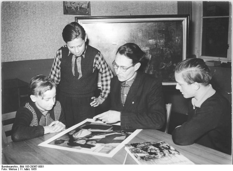 Gebesee, Jugendstunde Zentralbild TBD-Wohse 1 Motiv 11.3.1955 -2814- 4. Vorbereitungsstunde zur Jugendweihe in Gebesee bei Erfurt In der Zentralschule in Gebesee bei Erfurt beteiligen sich die Schüler an den Vorbereitungsstunden zur Jugendweihe. Die 4. Stunde behandelte das Thema "Was will der Maler mit seiner Kunst den Menschen sagen". Der Dozent für Ästhetik vom Institut für Kunsterziehung in Erfurt, Eberhard Menzel, war zu den Jugendlichen nach Gebesee gekommen und gab ihnen durch seinen Vortrag und durch Bildbetrachtungen Einblicke in die Bildende Kunst. Besonders eingehend wurde das Gemälde von Adolph Menzel "Eisenwalzwerk" besprochen. UBz: Jugendliche, die an der 4. Vorbereitungsstunde zur Jugendweihe teilnahmen: (von links nach rechts): Gerd Rothe, Joachim Drehmann, Dozent Eberhard Menzel und Jochen Nölferstedt.